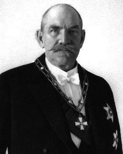 Pehr Evind Svinhufvud